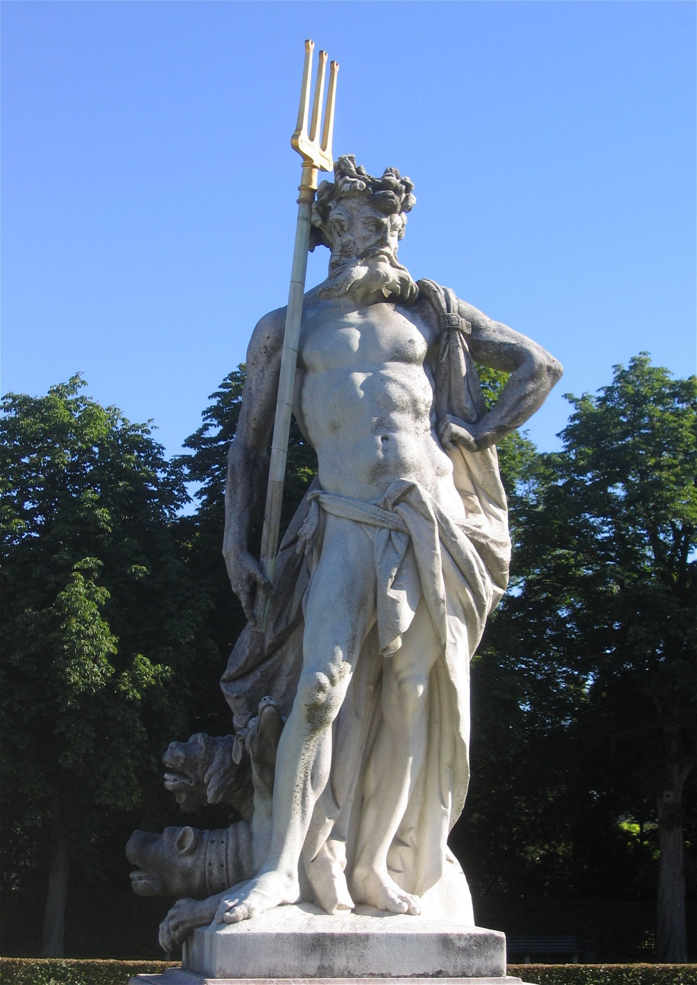 Schlosspark Nymphenburg, Statue im Gartenparterre, Pluto von Dominik Auliczek